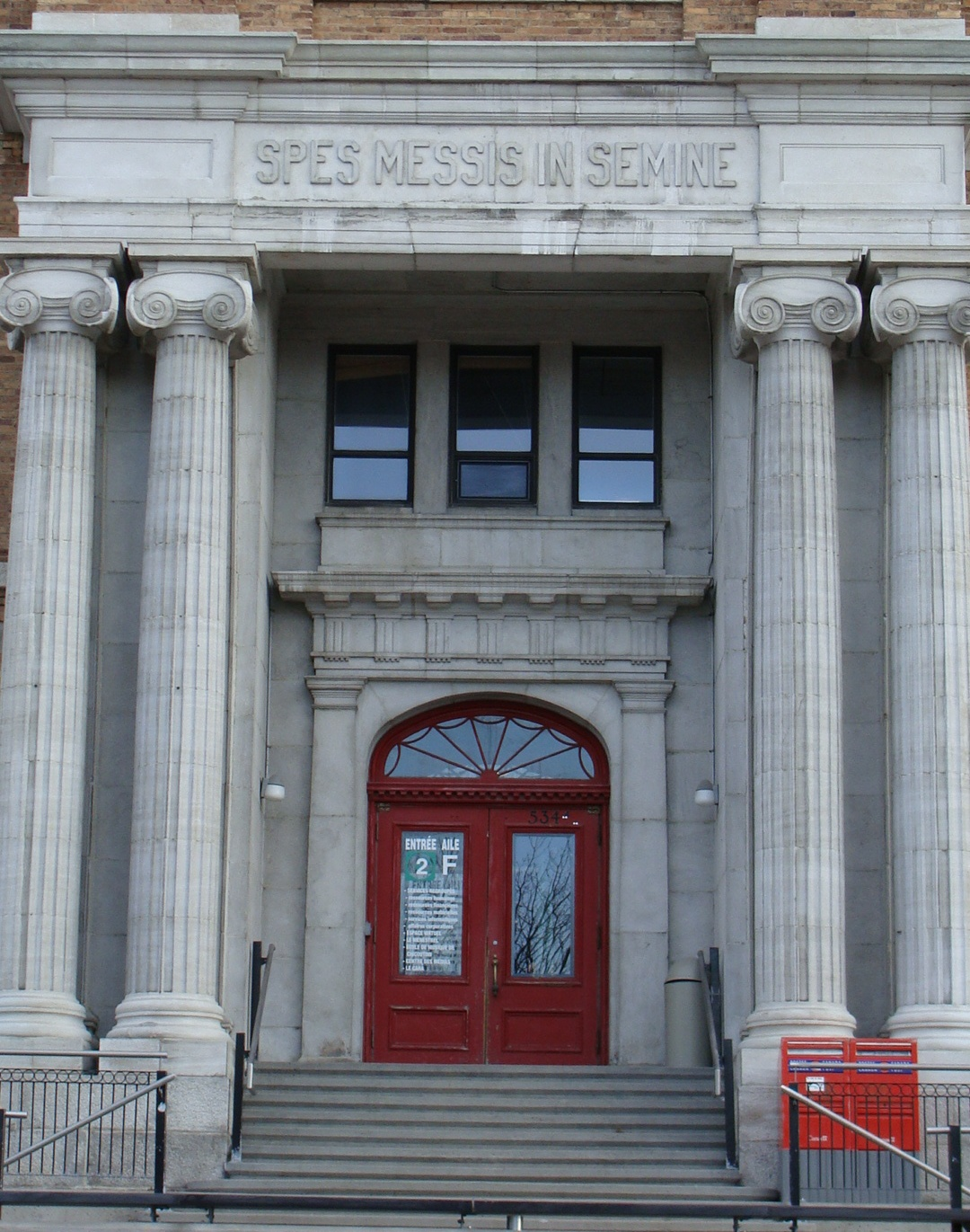 Entrée de l'ancien Séminaire de Chicoutimi (actuel Cégep de Chicoutimi), au Québec (Canada).